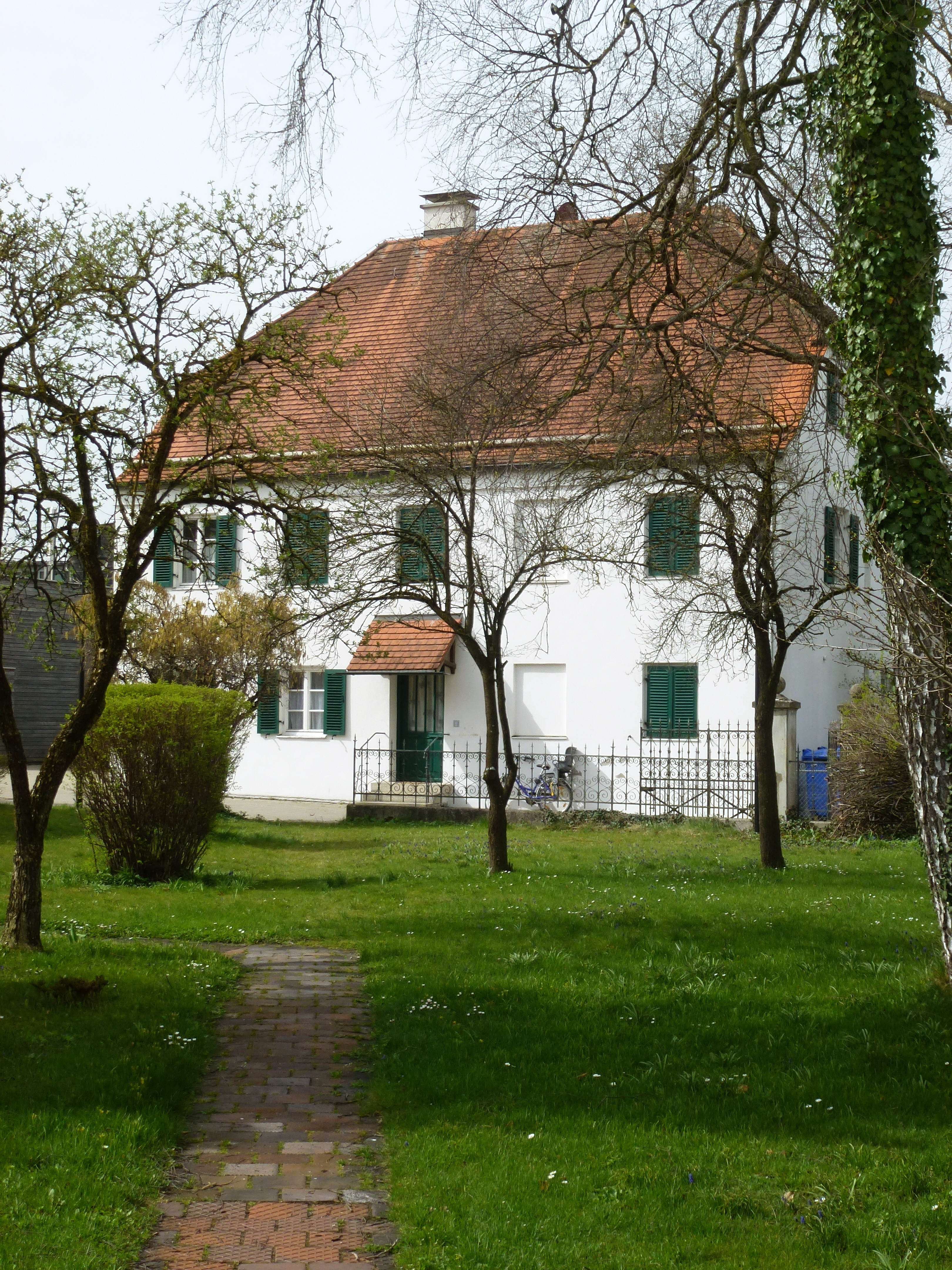 Emmering, Kirchplatz 1a: Katholisches Pfarrhaus. Aufnahme aus NordOst